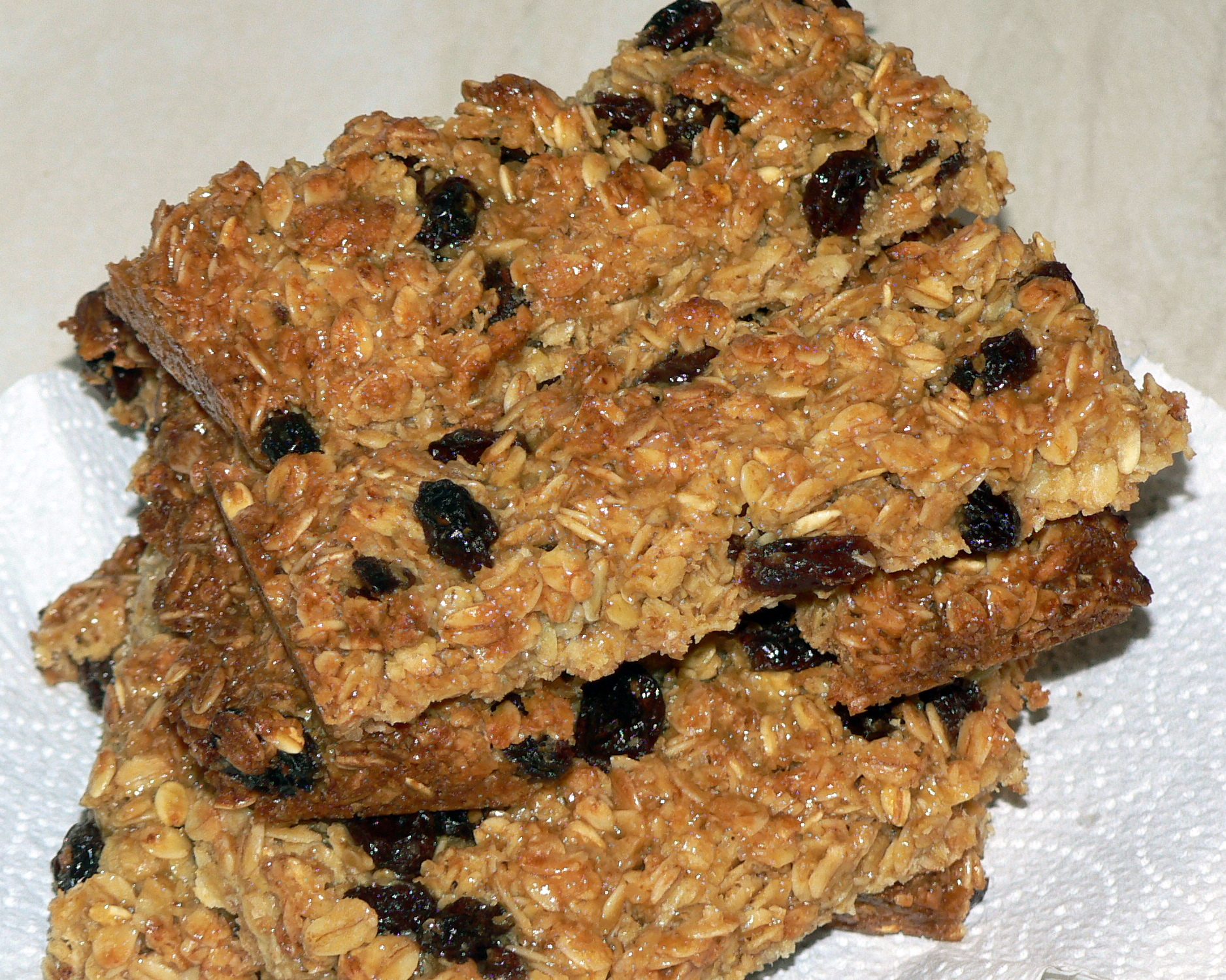 I've been baking again.